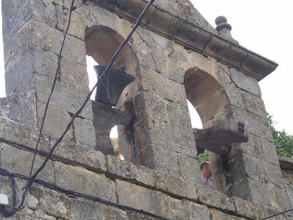 Volteo de campanas, Fiestas patronales 2006 de Bárcena de Pienza (Burgos, Castile and León).